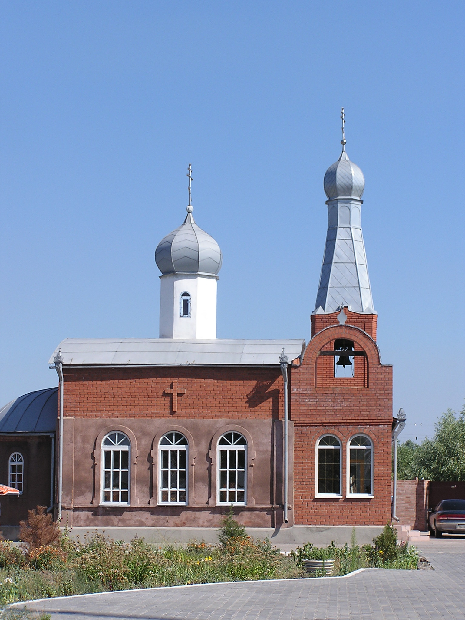 Белосарайская коса